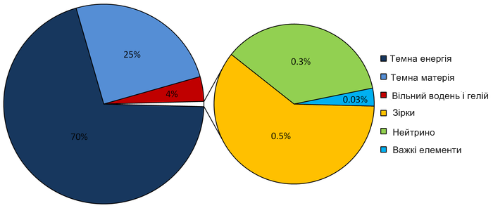 Склад Всесвіту за моделлю ΛCDM. Кругова діаграма складу Всесвіту